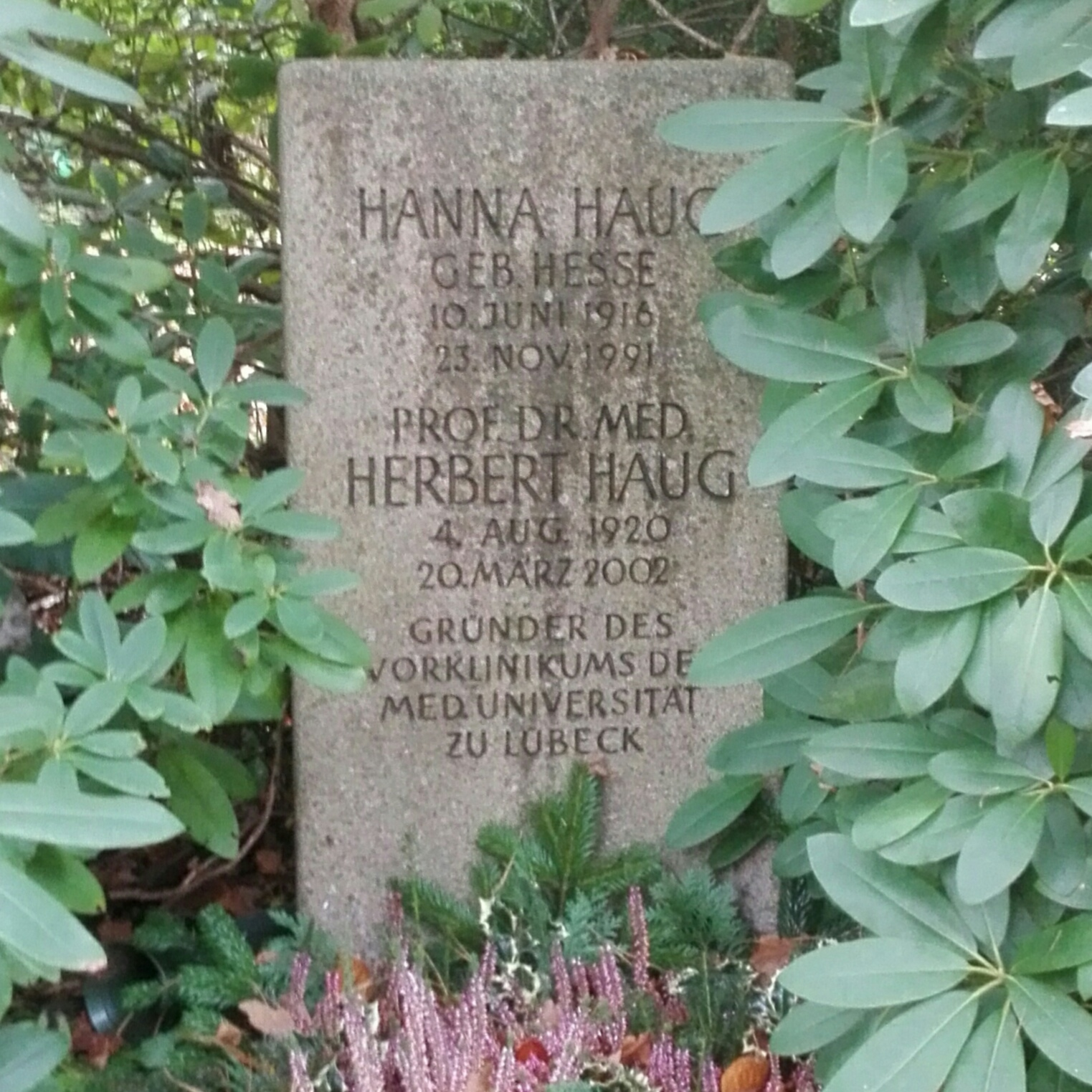 Herbert Haug ist der Begründer des Vorklinikums an der Universität in Lübeck gewesen.